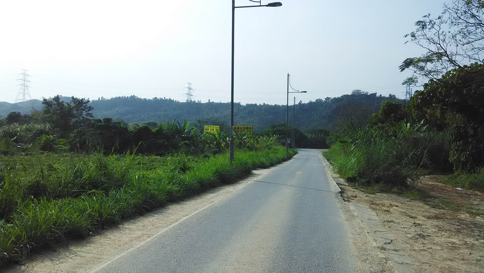 中文（香港）: 蓮麻坑道一景